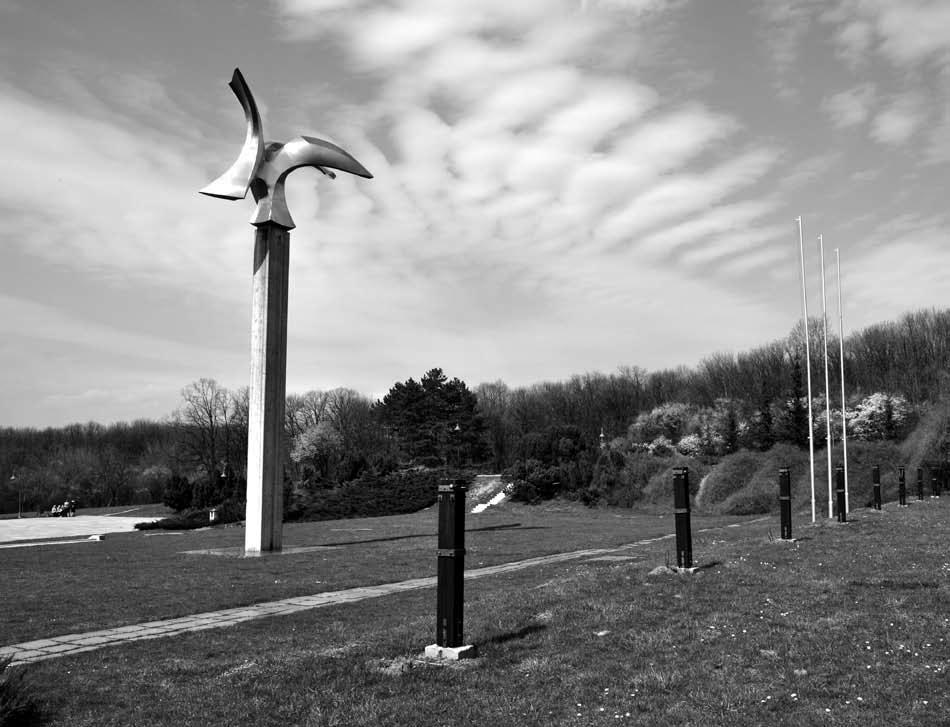 Srpskohrvatski / српскохрватски: Spomen park Jajinci